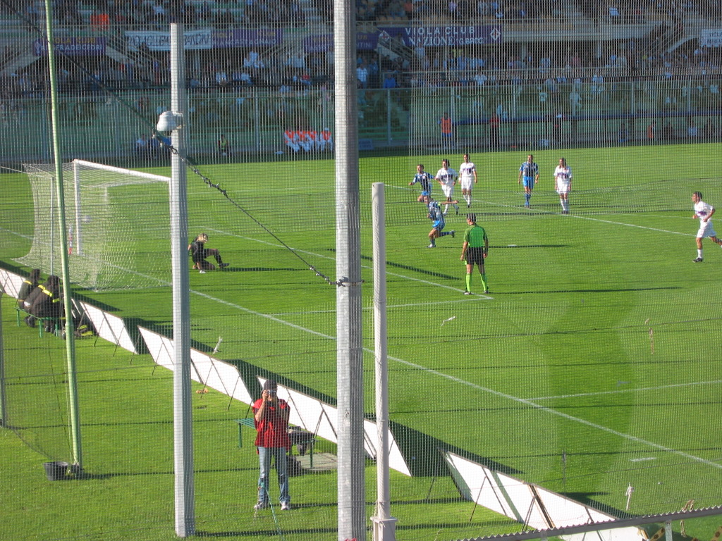 Il calcio di rigore di Davide Di Nicola che ha portato il Rimini avanti di due gol all'Artemio Franchi di Firenze contro la Florentia Viola, continuazione storica della Fiorentina. Calcio Serie C2 2002-2003.